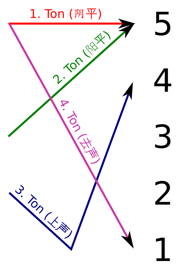 Die vier Töne des Hochchinesischen in Tonkonturen dargestellt (nach Zhào Yuánrèn)